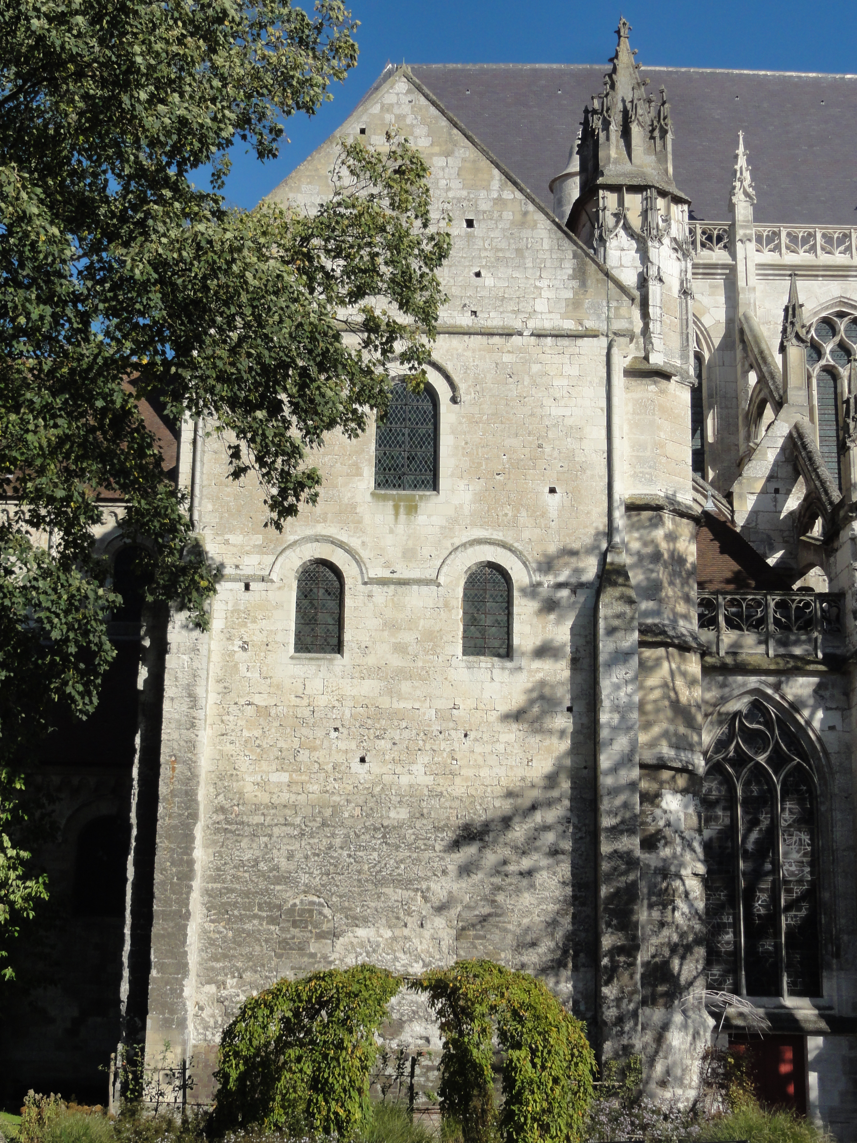 Croisillon sud.